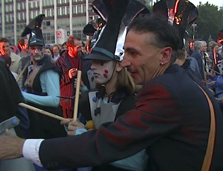 Internationale Kulturtage der Stadt Dortmund 2000, Transe Express: „Lâcher de Violons“ (Straßentheater)